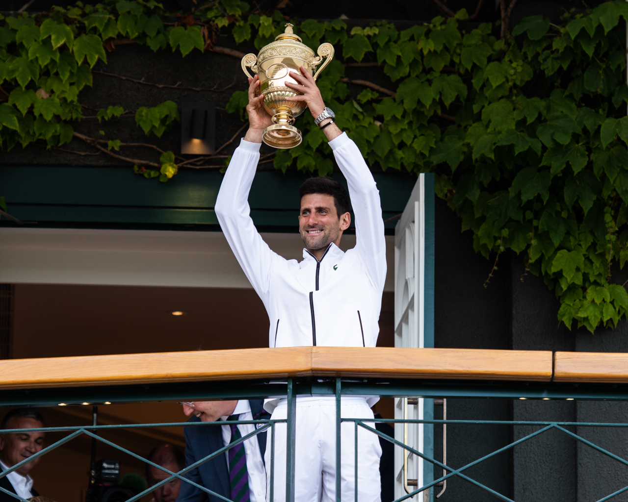 Novak Djokovic